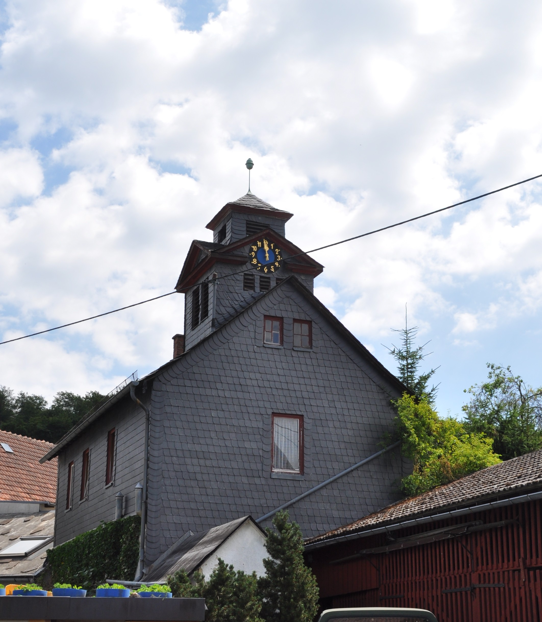 Backhaus (Backes) von Mauloff